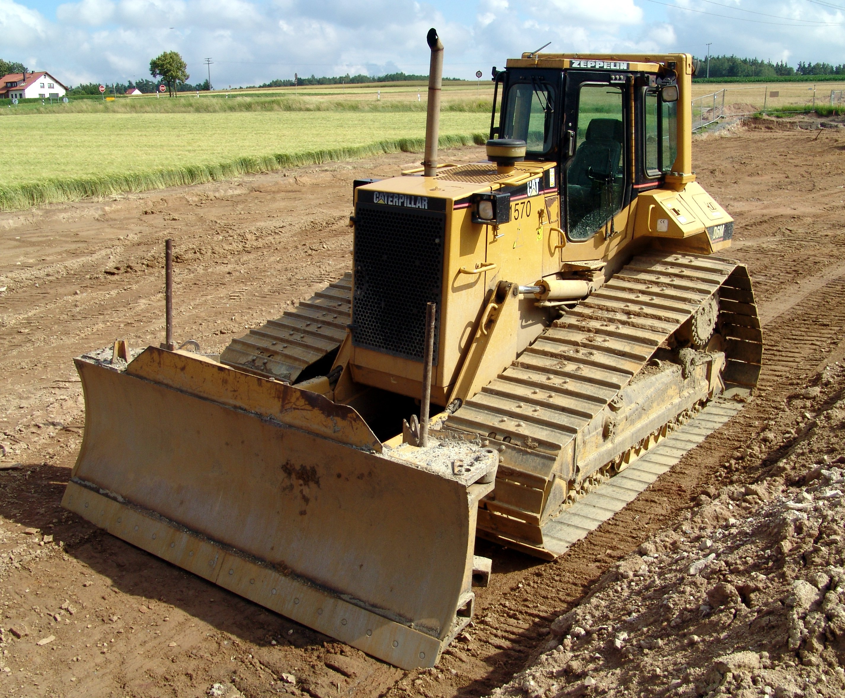 Caterpillar D6M Planierraupe